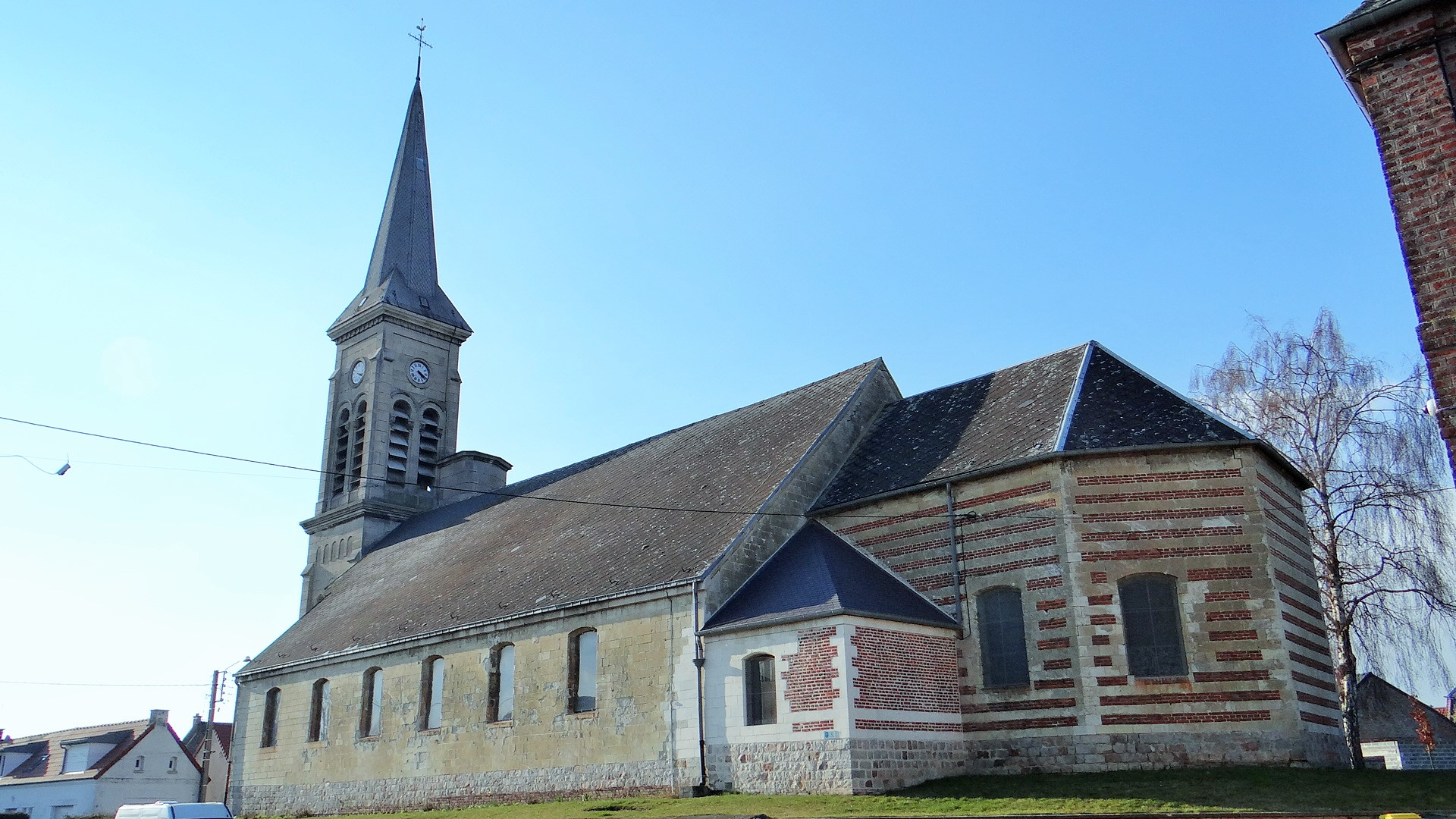 Église de Villers en Cauchies